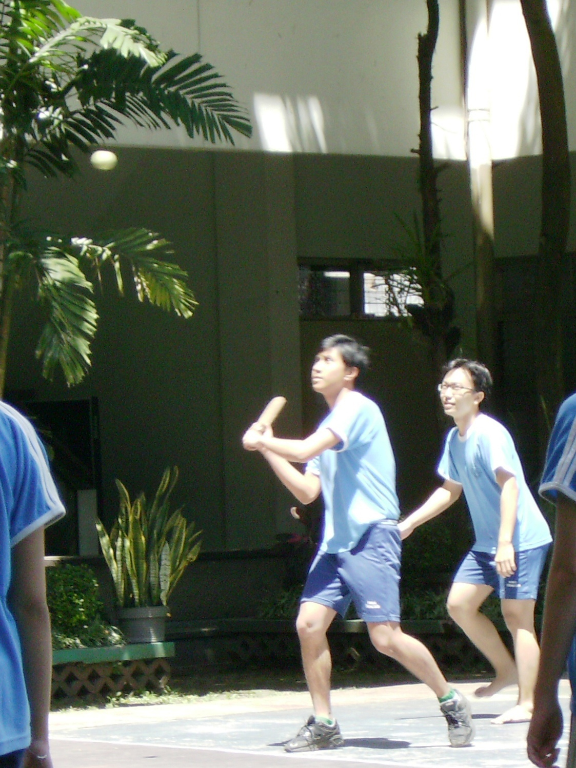 Seorang siswa SMA Trinitas berusaha memukul bola dalam permainan kasti (bola di bagian kiri atas foto)